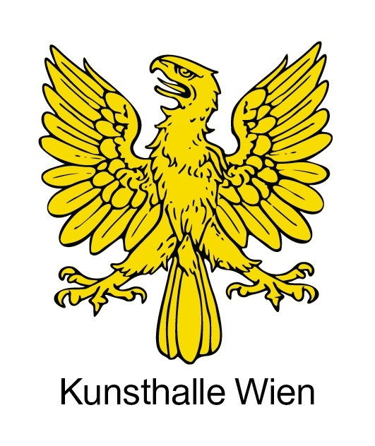 Kunsthalle Wien Corporate Design Adler